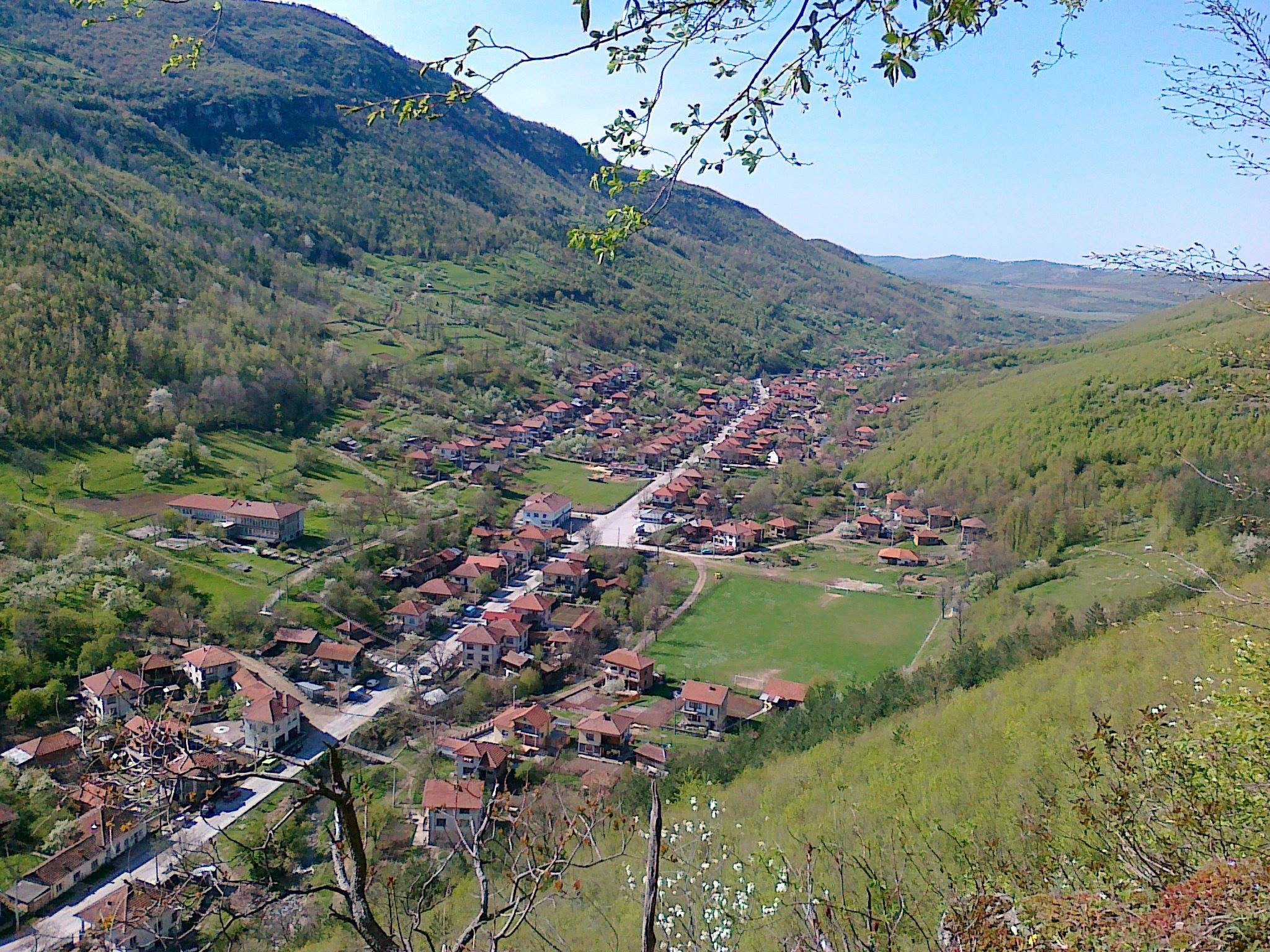 Центъра на селото гледан от високо.